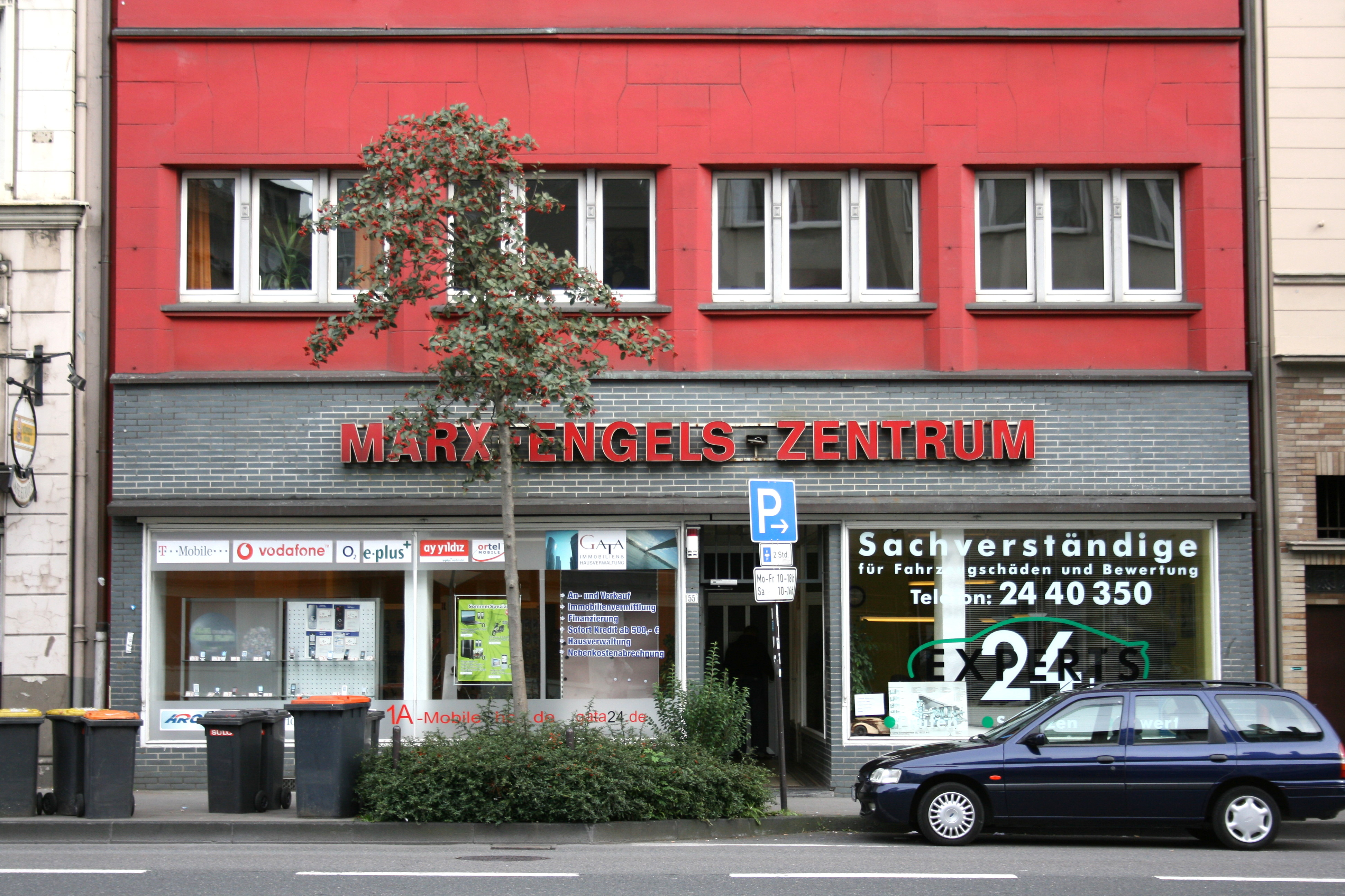 Gathe in Wuppertal-Elberfeld